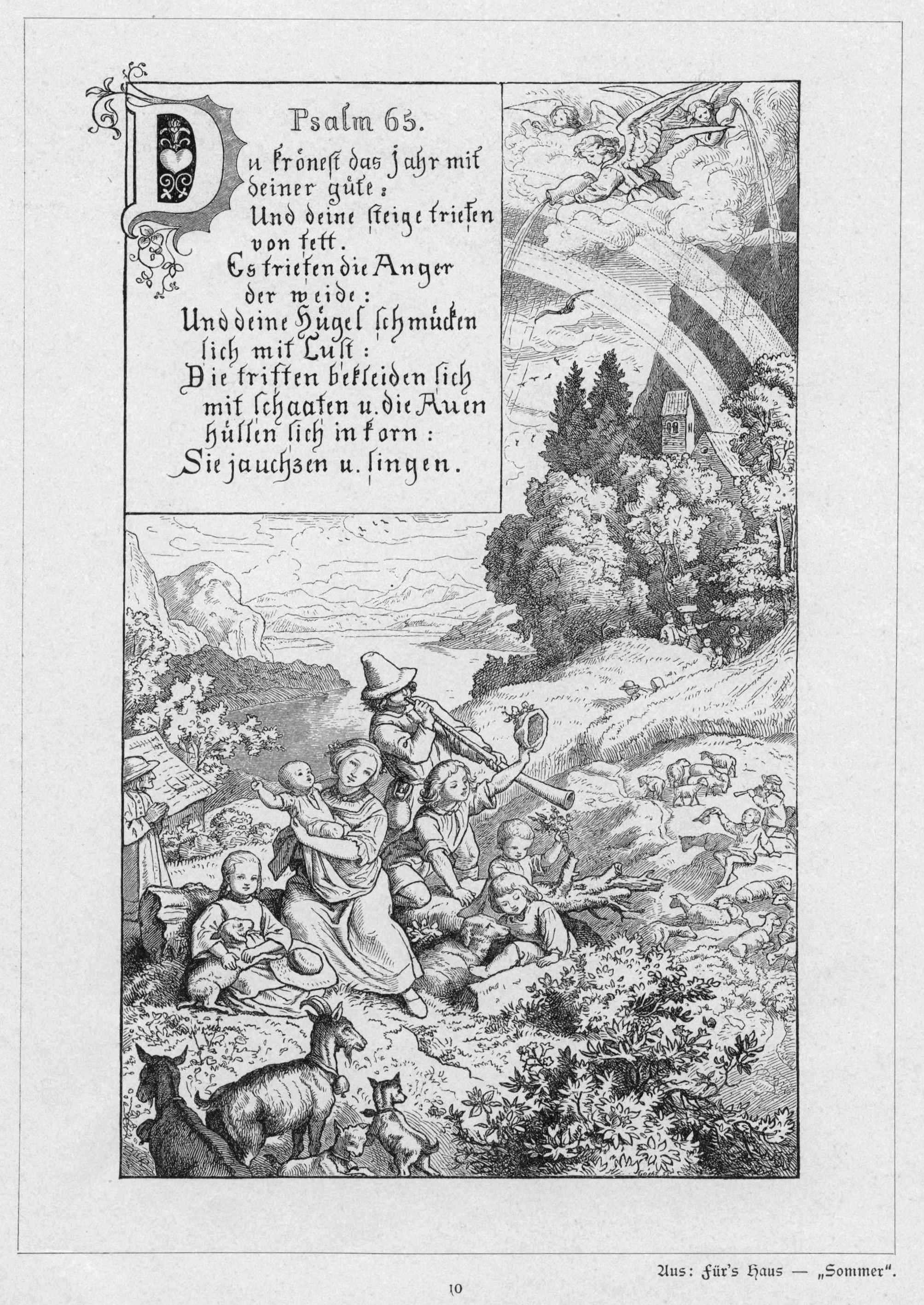 Psalm 65. Aus: Für’s Haus – „Sommer“.